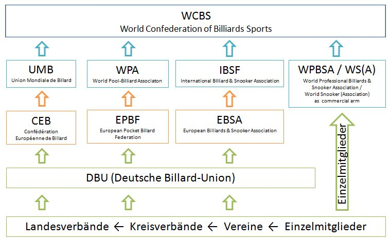 Übersicht der verschiedenen deutschen und übergeordneten internationalen Billard-Verbände